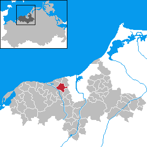 Admannshagen-Bargeshagen in Mecklenburg-Western Pomerania - District Bad Doberan